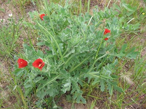 Galucium corniculatum plant